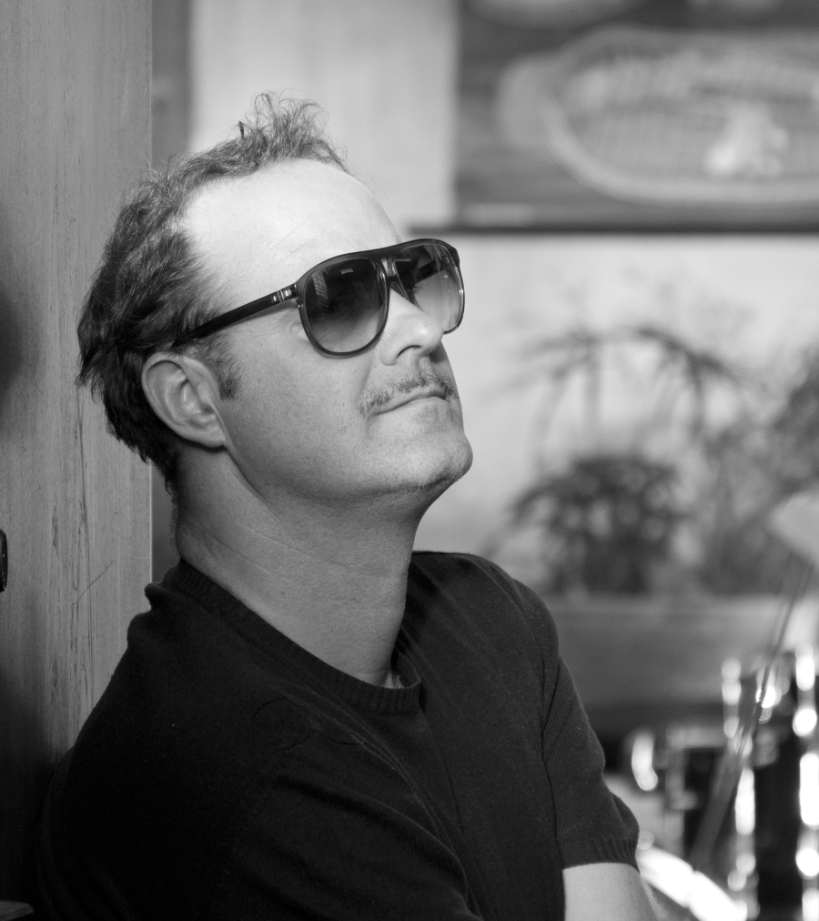 Theater-Regisseur Nikola Duric